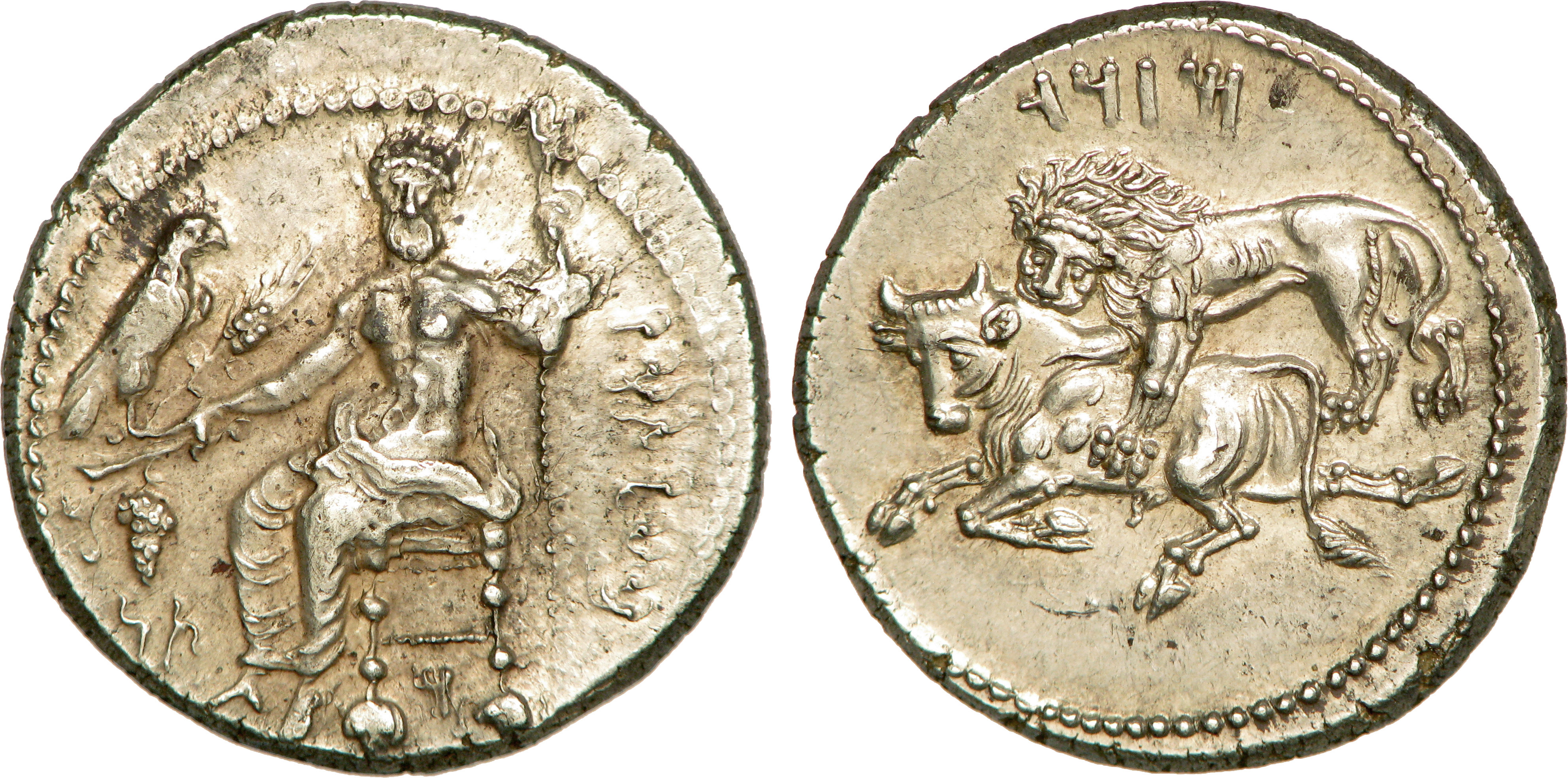 Nom de l'atelier : Cilicie, Tarse Métal : argent Diamètre : 24mm Axe des coins : 3h. Titulature avers : (BLTRZ, "Baal Tarz" = Baaltars) en araméen. Description avers : Baaltars assis à gauche, tourné de face, tenant de la main droite un cep de vigne sur lequel est placé un aigle debout à droite et de la gauche, un sceptre long ; sous le trône, un monogramme. Titulature revers : (MZDI, "Mazdai" = Mazaios) en araméen. Description revers : Lion attaquant un taureau et le dévorant.